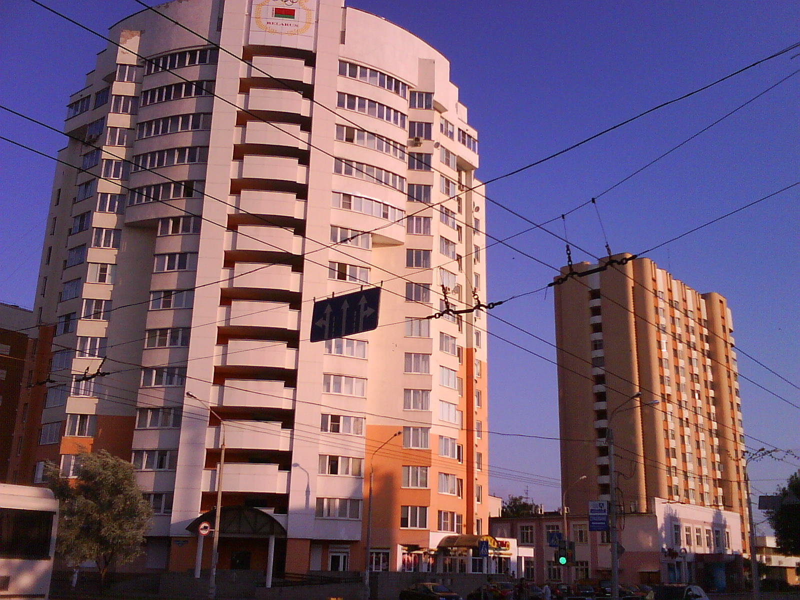 Жилые дома